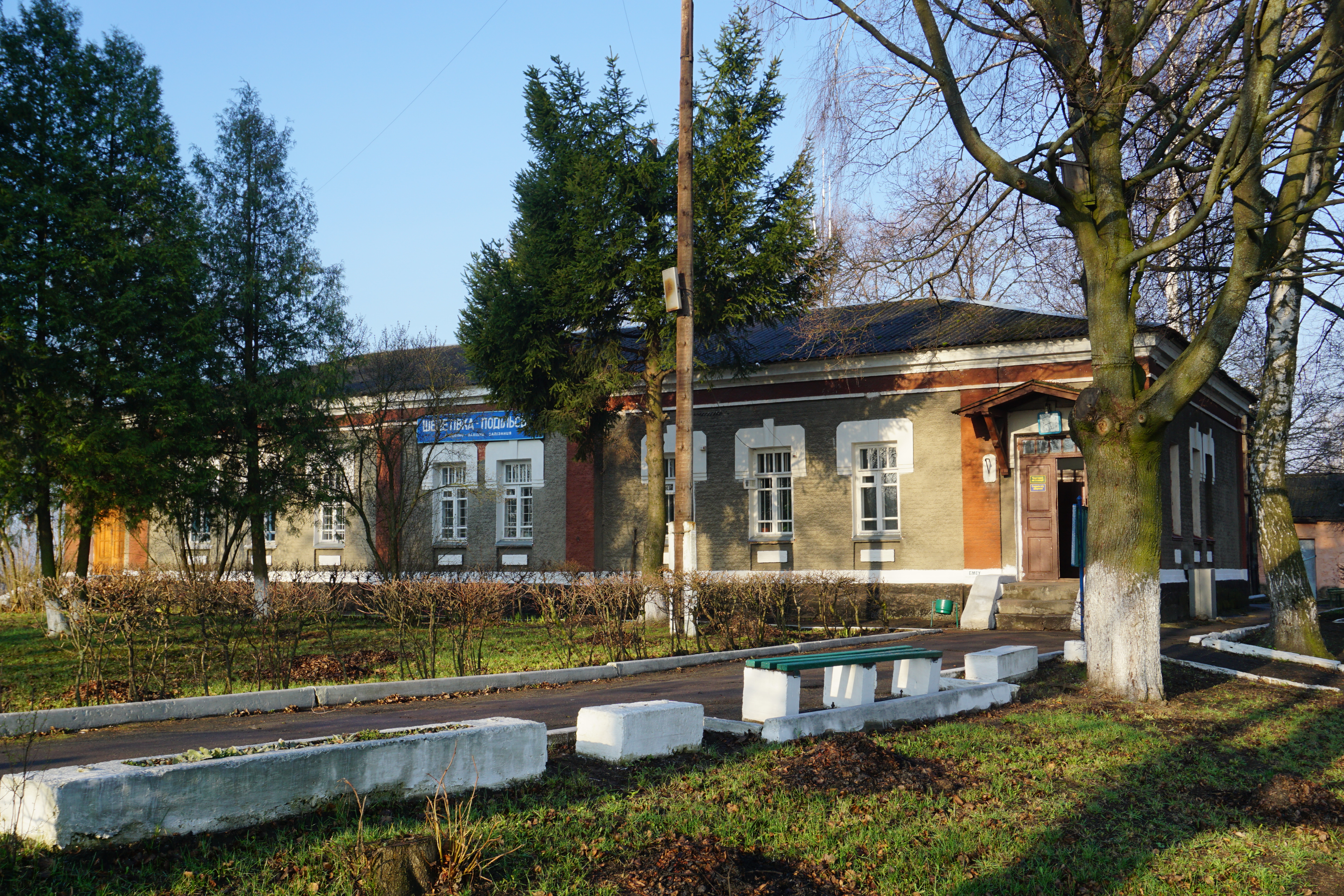 Вокзал станції Шепетівка-Подільська Південно-Західної залізниці. Вид з боку залізниці.